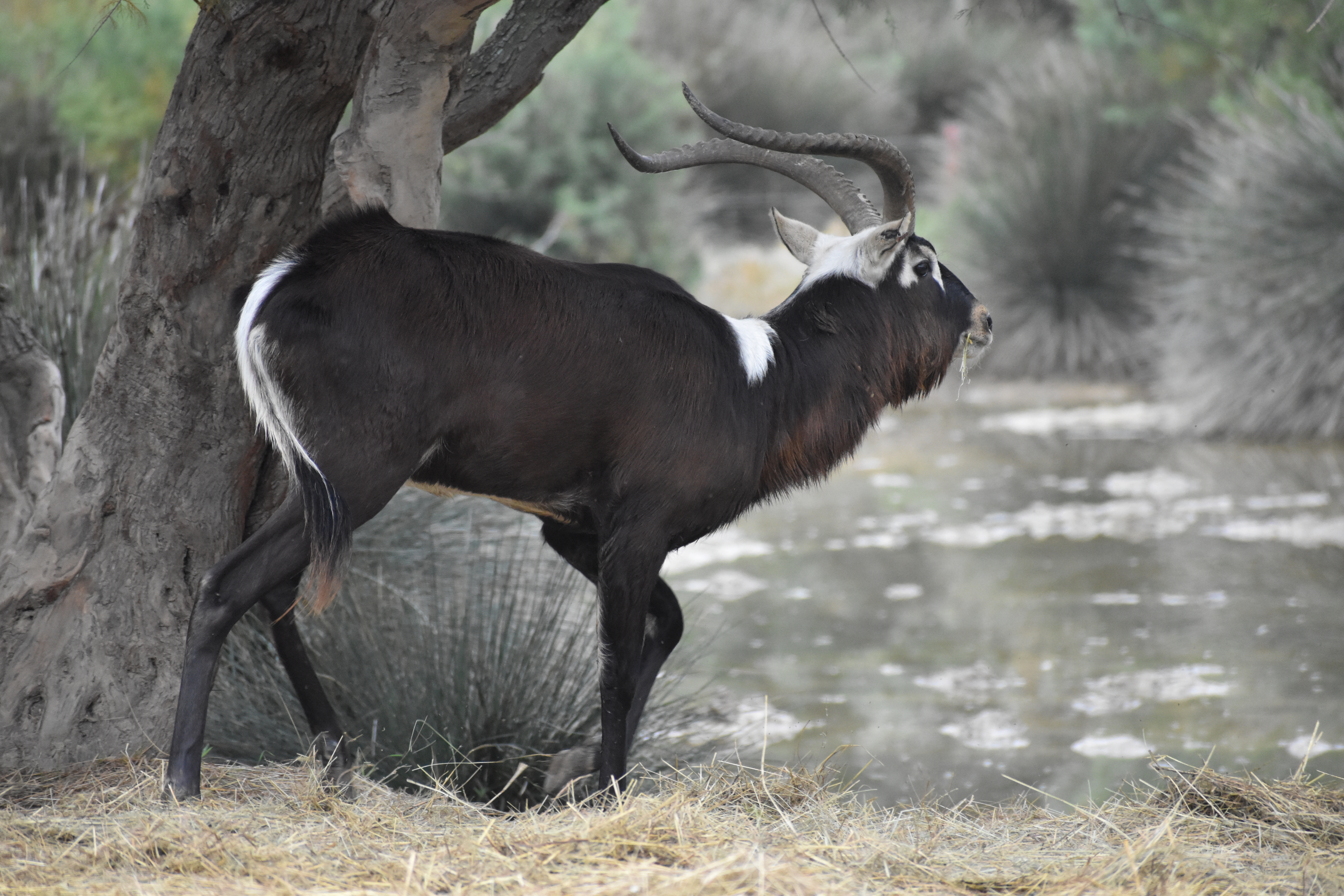 Cobe de Mrs Gray dans la Réserve de Sigean.